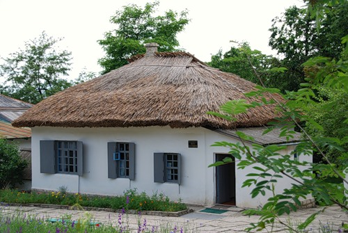 Домик в Пятигорске, в котором М. Ю. Лермонтов прожил последние два месяца своей жизни (с 14 (26) мая по 15 (27) июля 1841 года).